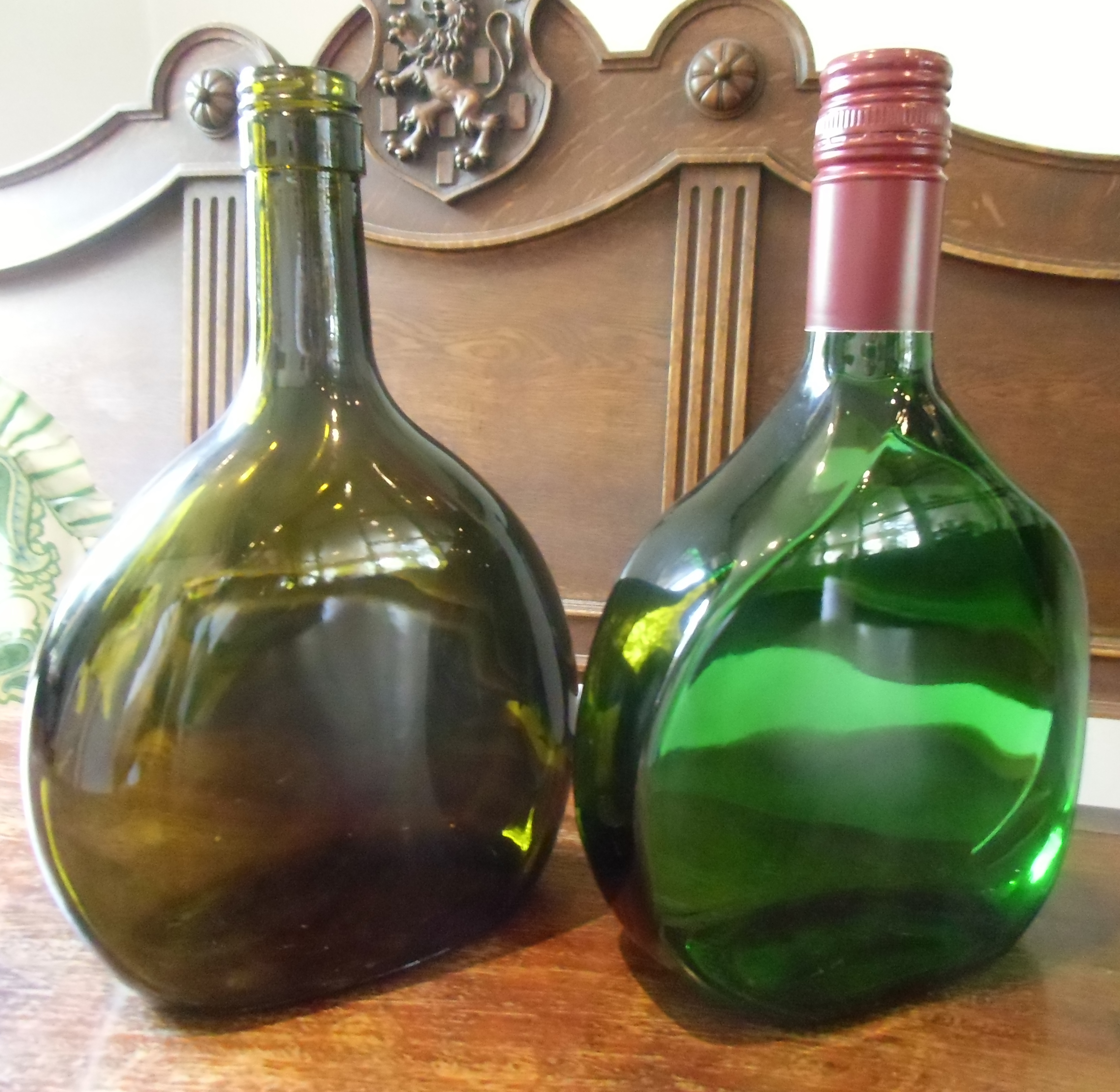 Bocksbeutelformen: alt (links) und Bocksbeutel PS (rechts).